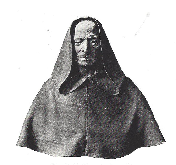 Wachsbüste des Fra Domenico Paganelli, 1624 aus: Julius von Schlosser: Tote Blicke: Geschichte der Porträtbildnerei in Wachs; ein Versuch / Julius von Schlosser, 1910